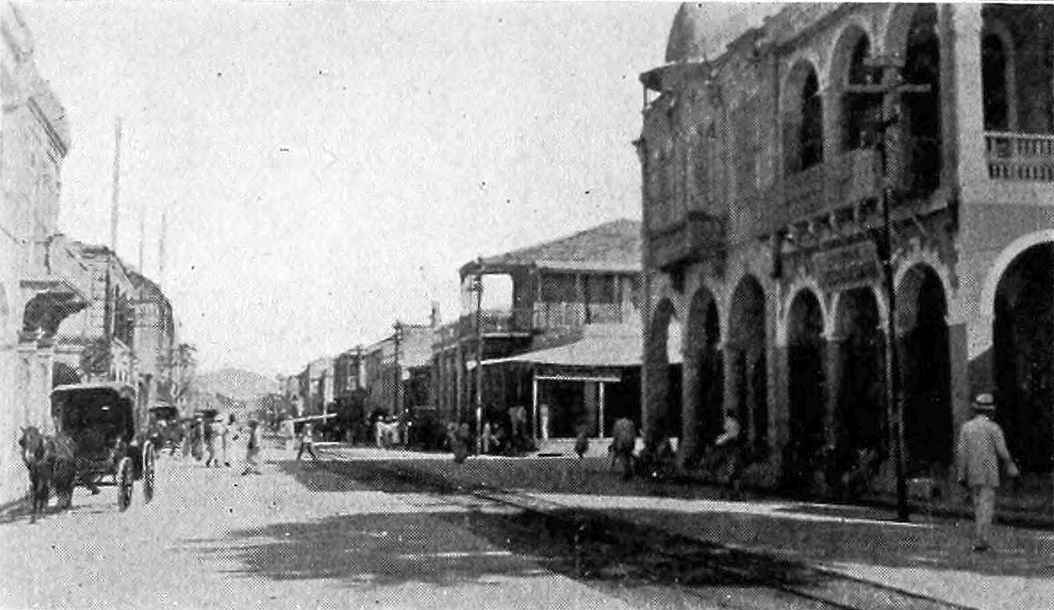 Port-au-Prince, Haiti.